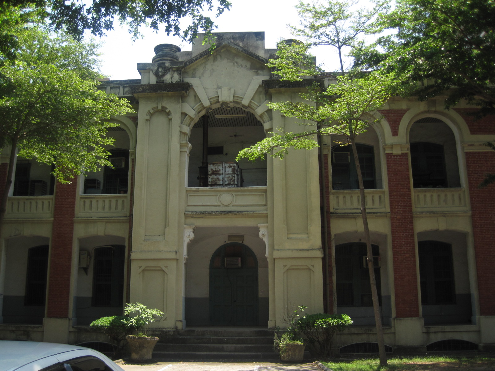 中文（台灣）: 成功大學禮賢樓北面入口。